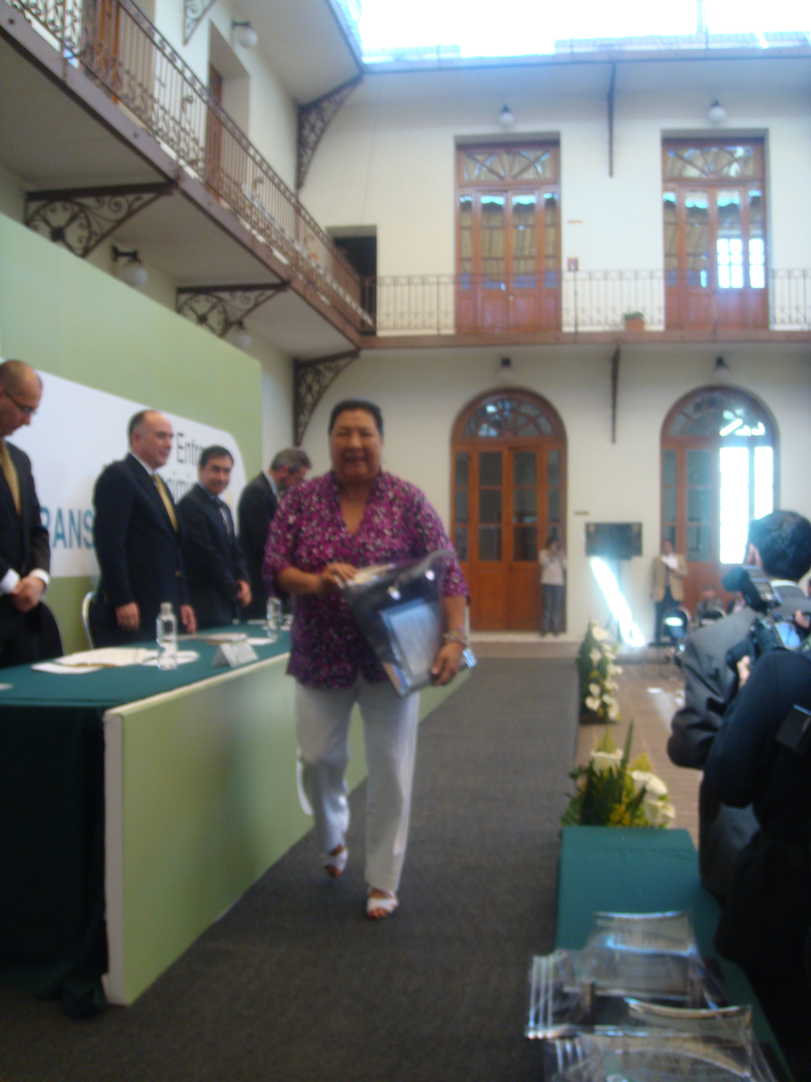 Elva Martha recibiendo premios de transparencia en el InfoDF.